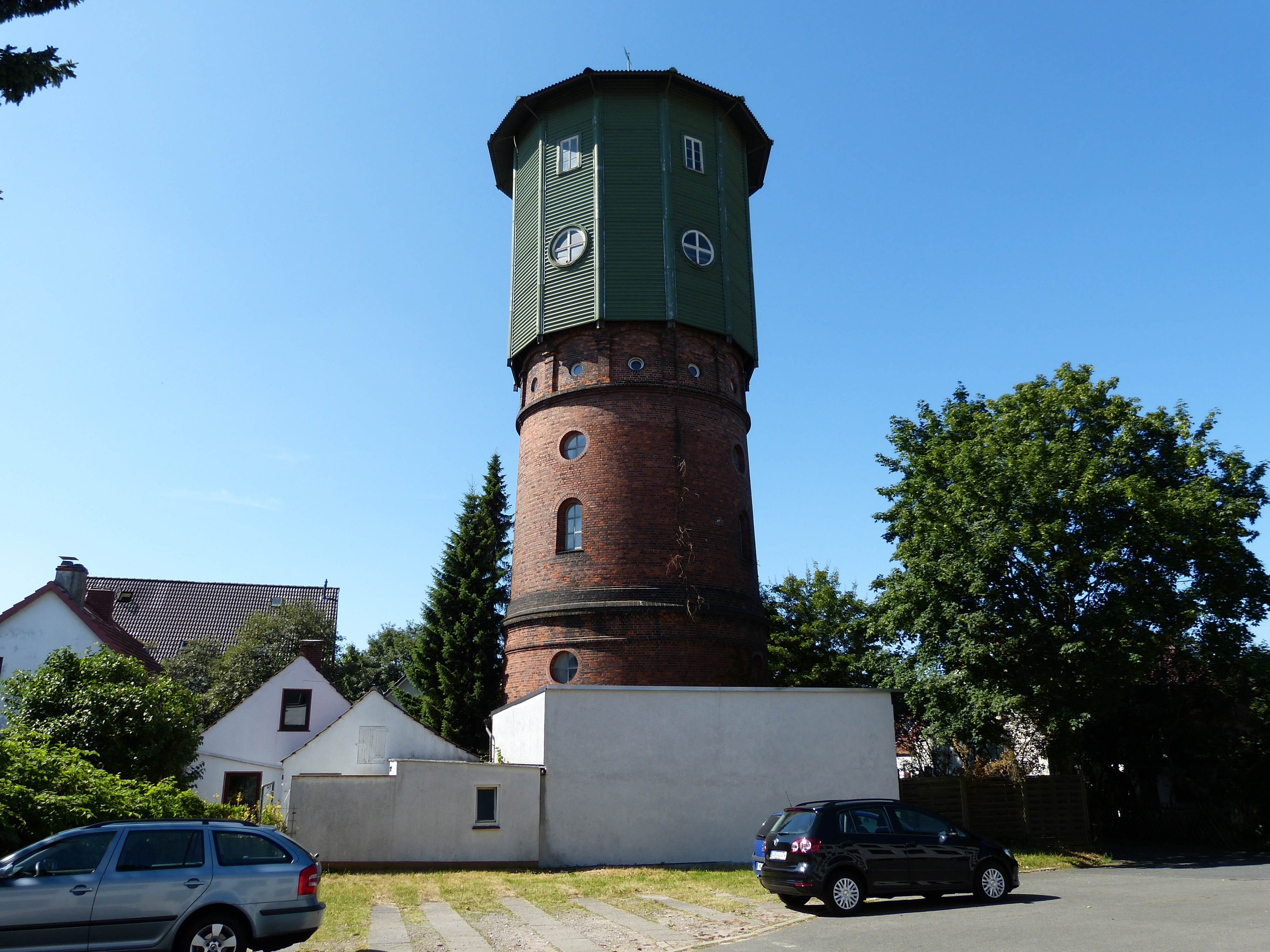 Wasserturm in Bremen, Bermpohlstraße 40 Das abgebildete Objekt ist ein geschütztes Kulturdenkmal in der Freien Hansestadt Bremen, mit der Nr. 2159 beim Landesamt für Denkmalpflege registriert.